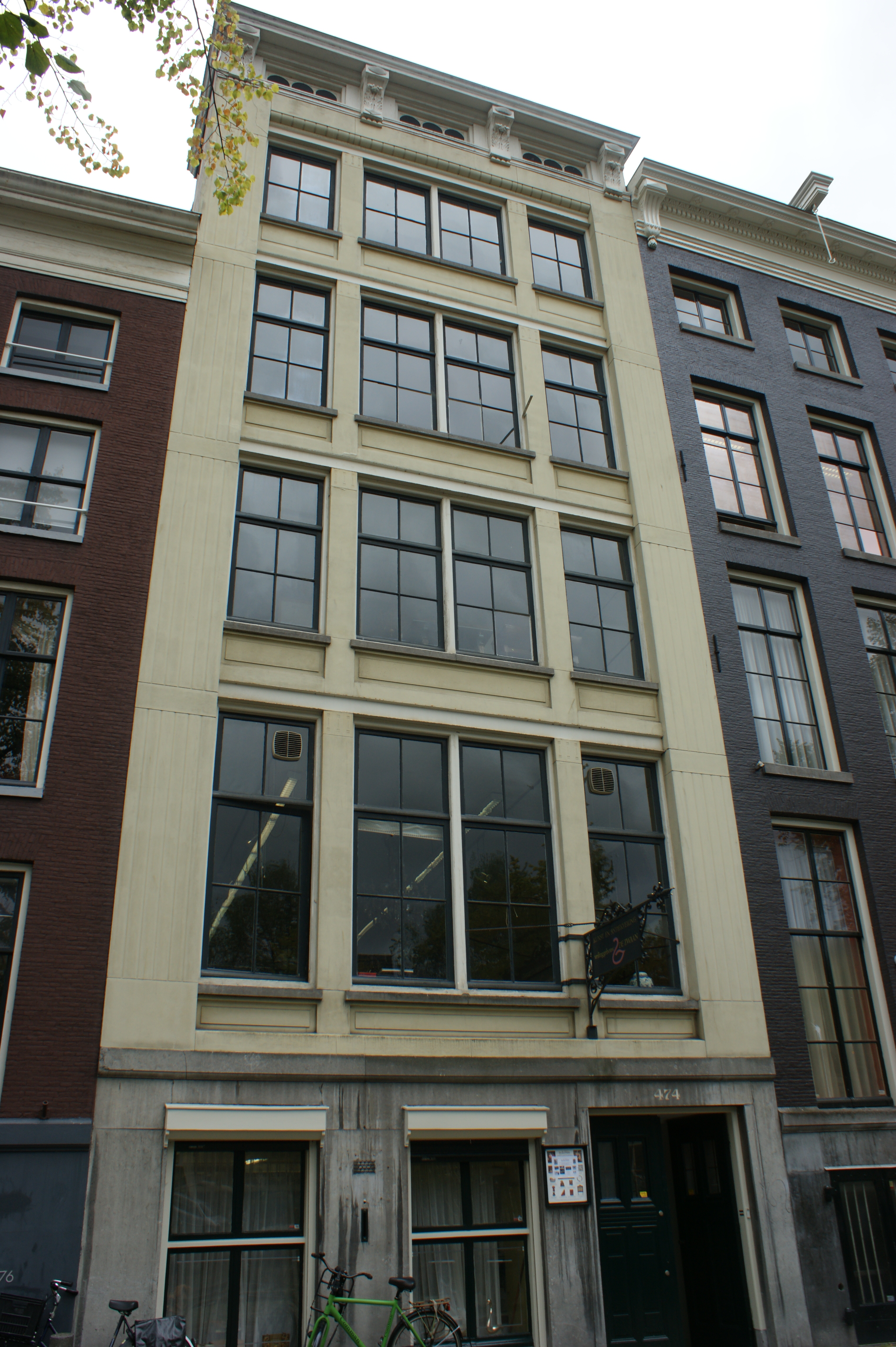 Amsterdam, Keizersgracht 474